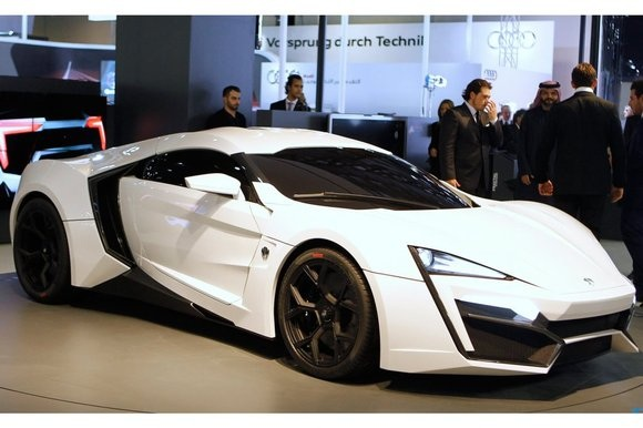 Lykan-hypersport-worlds-most-expensive-car